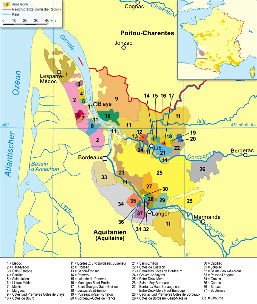 Karte Weinbaugebiet Bordeaux (Modifizierte Fassung von Bild:Weinbaugebiete-frankreich-bordeaux.png)